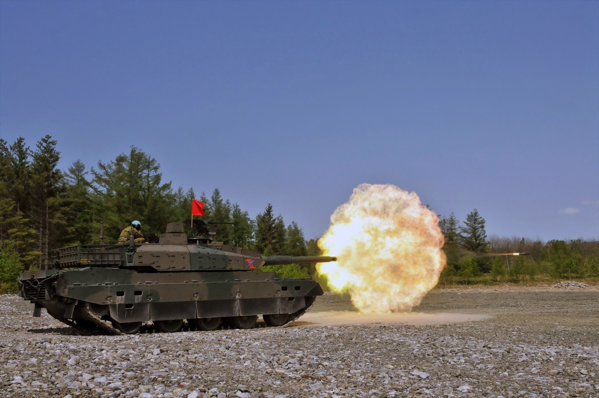 １０式戦車（第２戦車連隊）